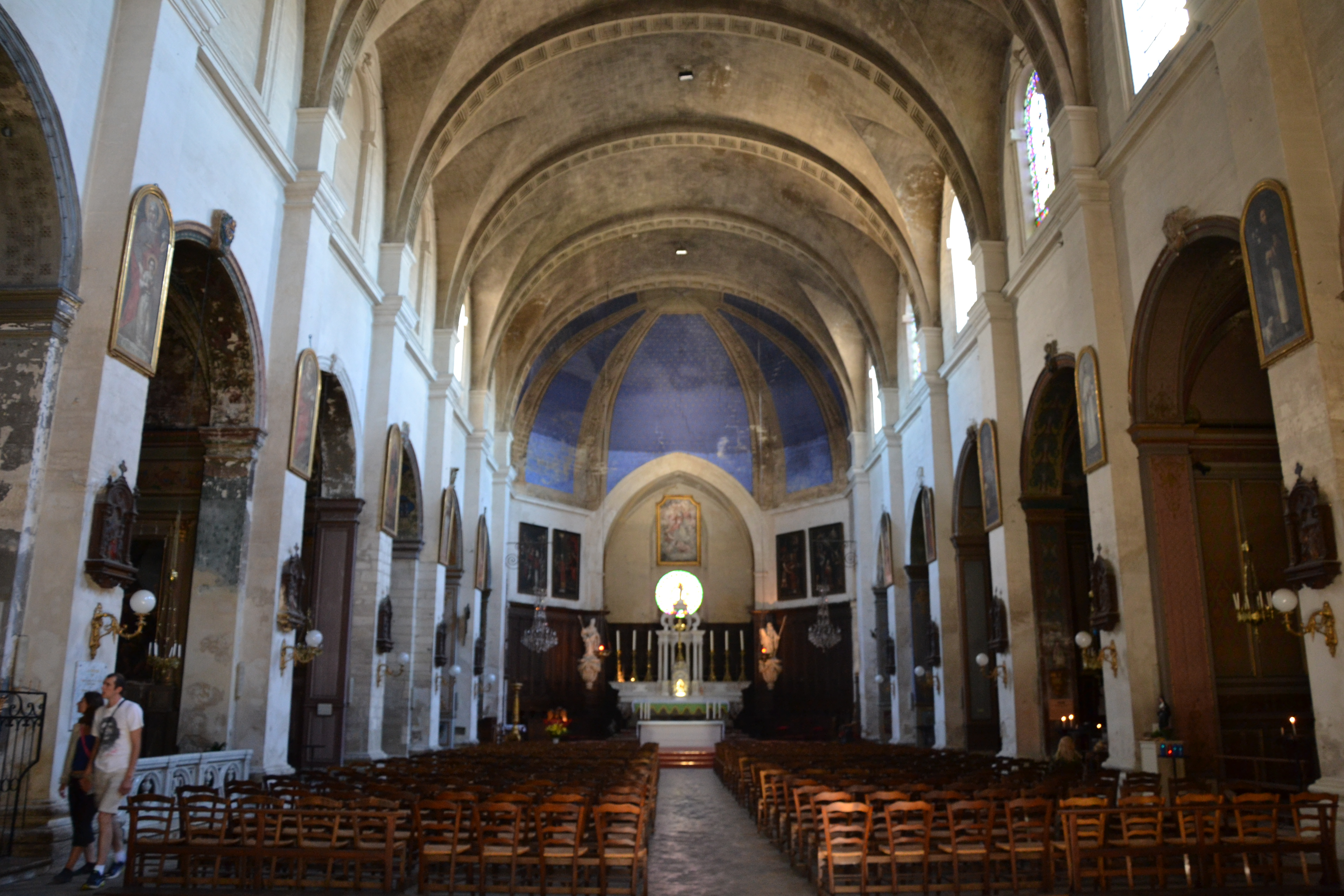 Église Saint-Symphorien-les-Carmeséglise, cloître, nef (ClasséInscrit) .